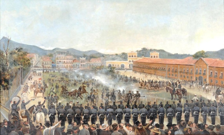 Oscar Pereira da Silva - Proclamação da República, 1889. Óleo sobre tela, 80 x 124 cm. Acervo do Museu Casa de Benjamin Constant, Rio de Janeiro.